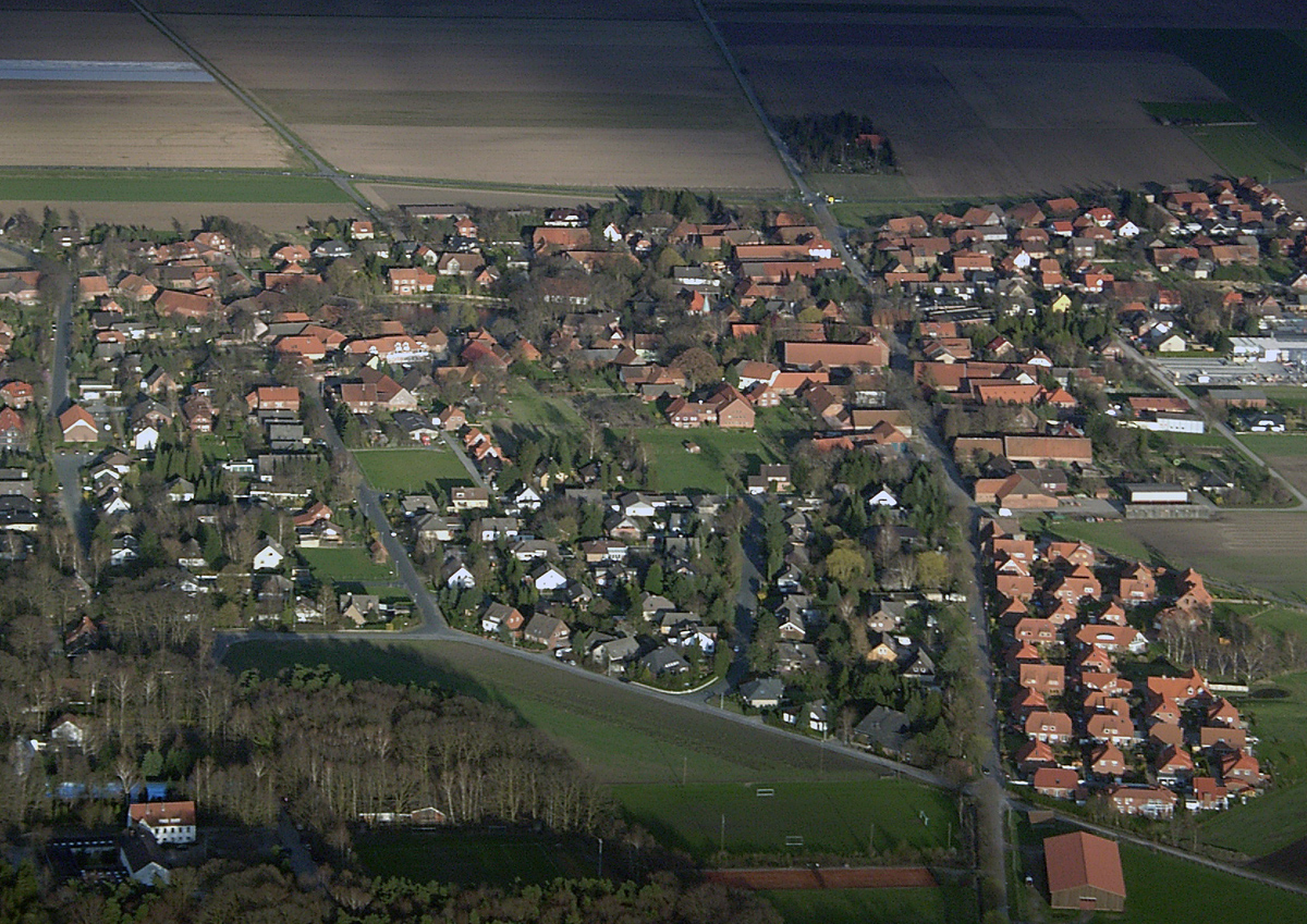 Luftbild von Arpke in Richtung Osten